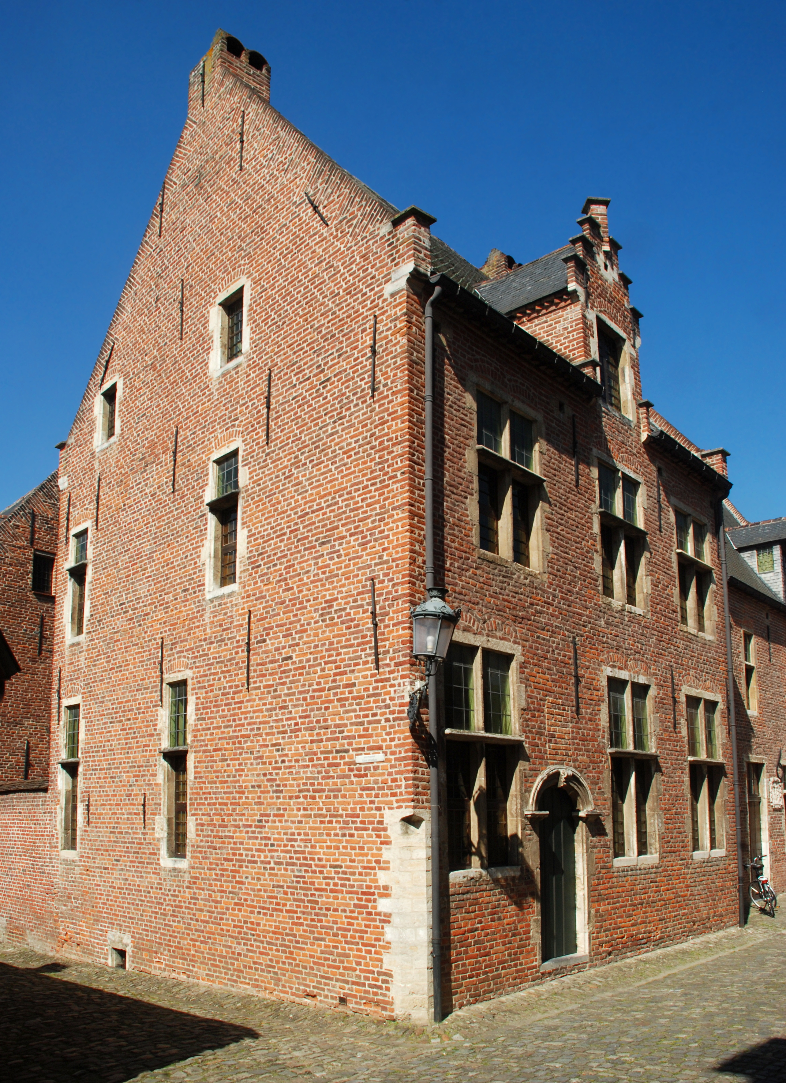 Belgium - Leuven - Groot Begijnhof - Bovenstraat n° 76